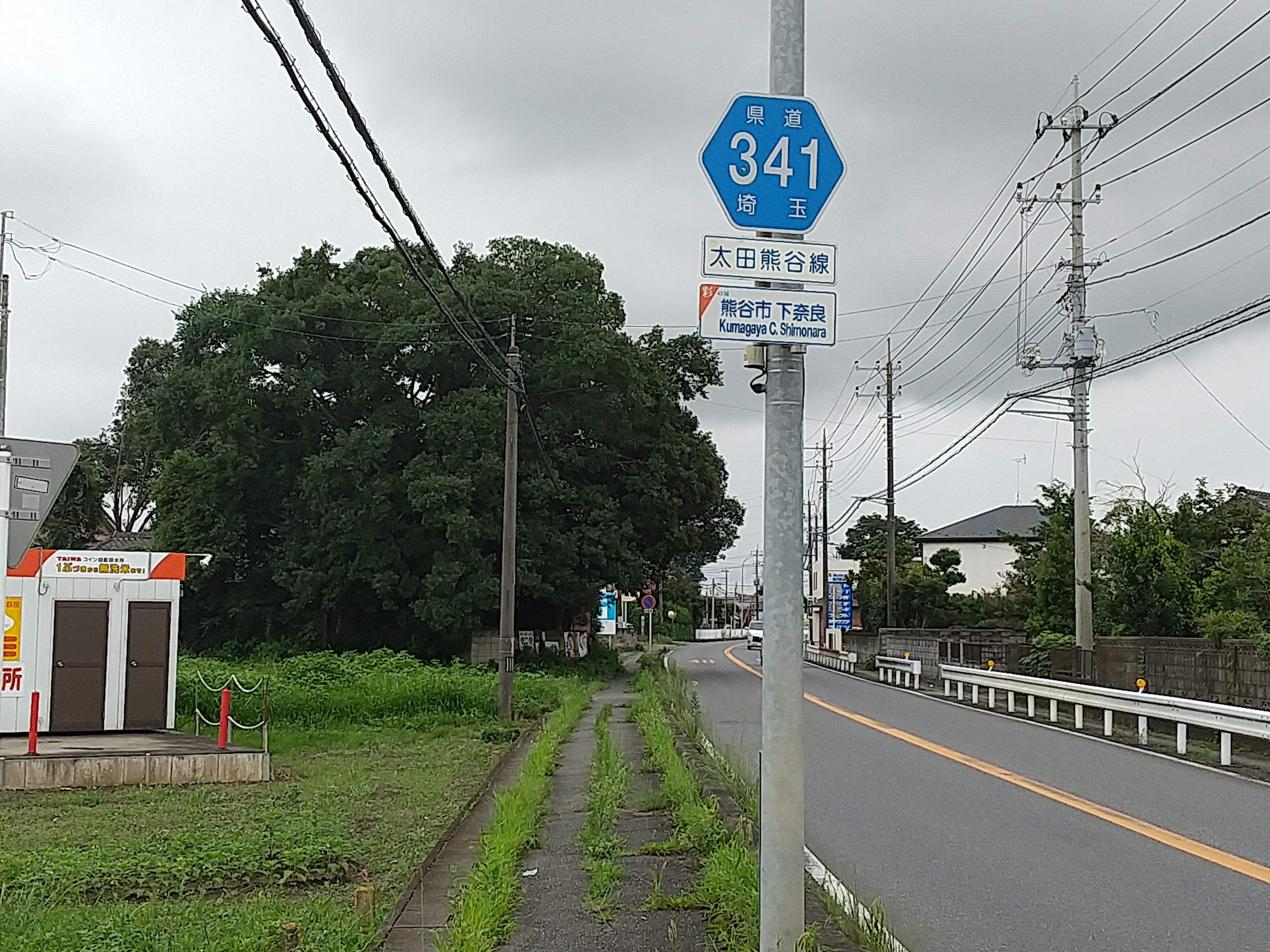 熊谷市下奈良付近にて